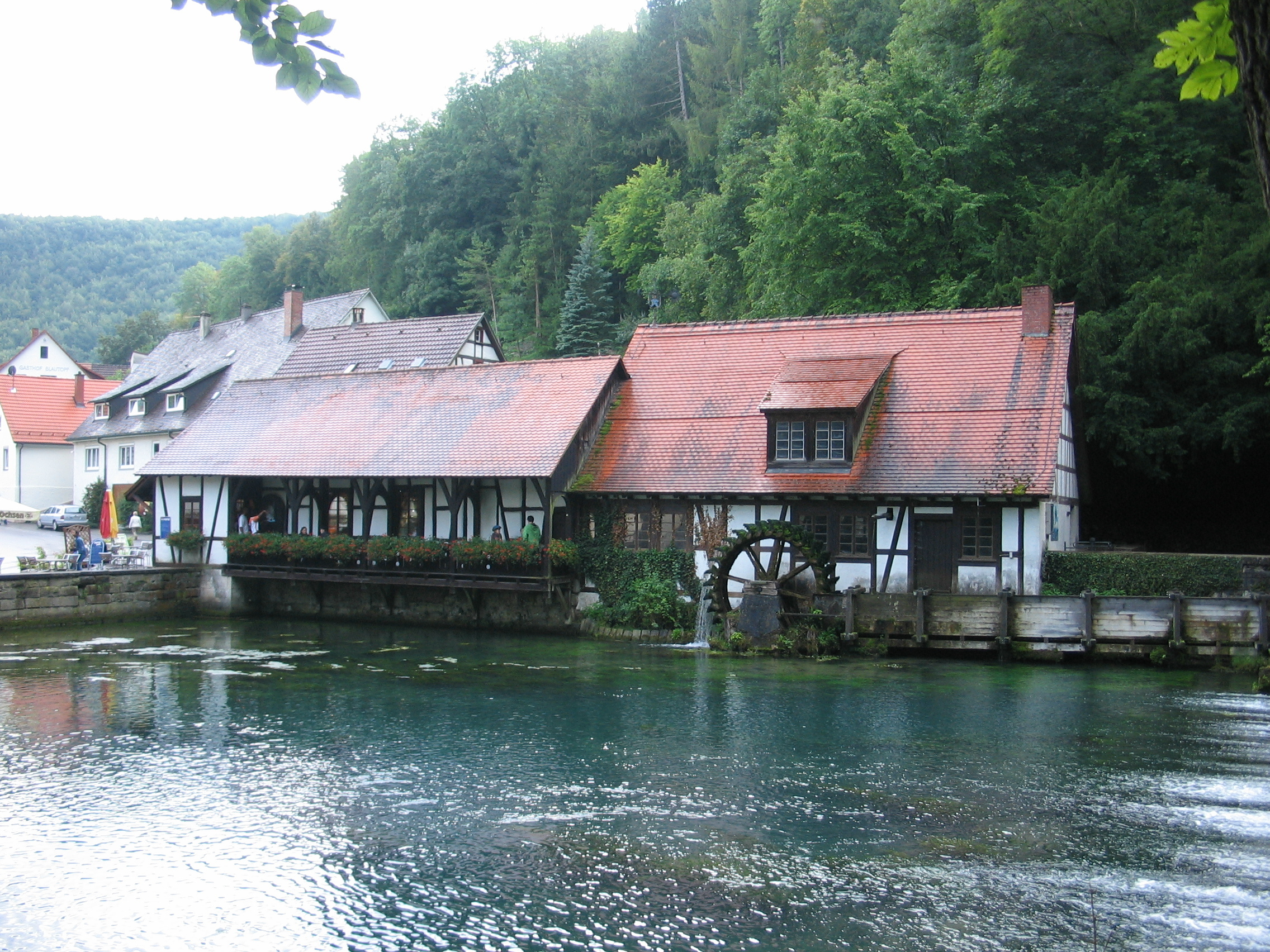 Hammermühle am Blautopf, Blaubeuren.